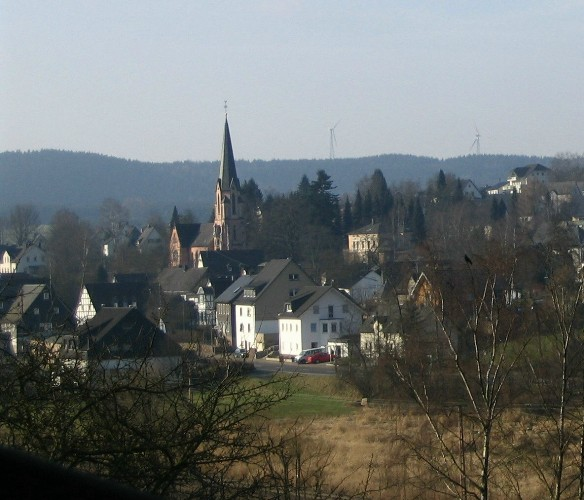 Ortsmitte von Welschen Ennest